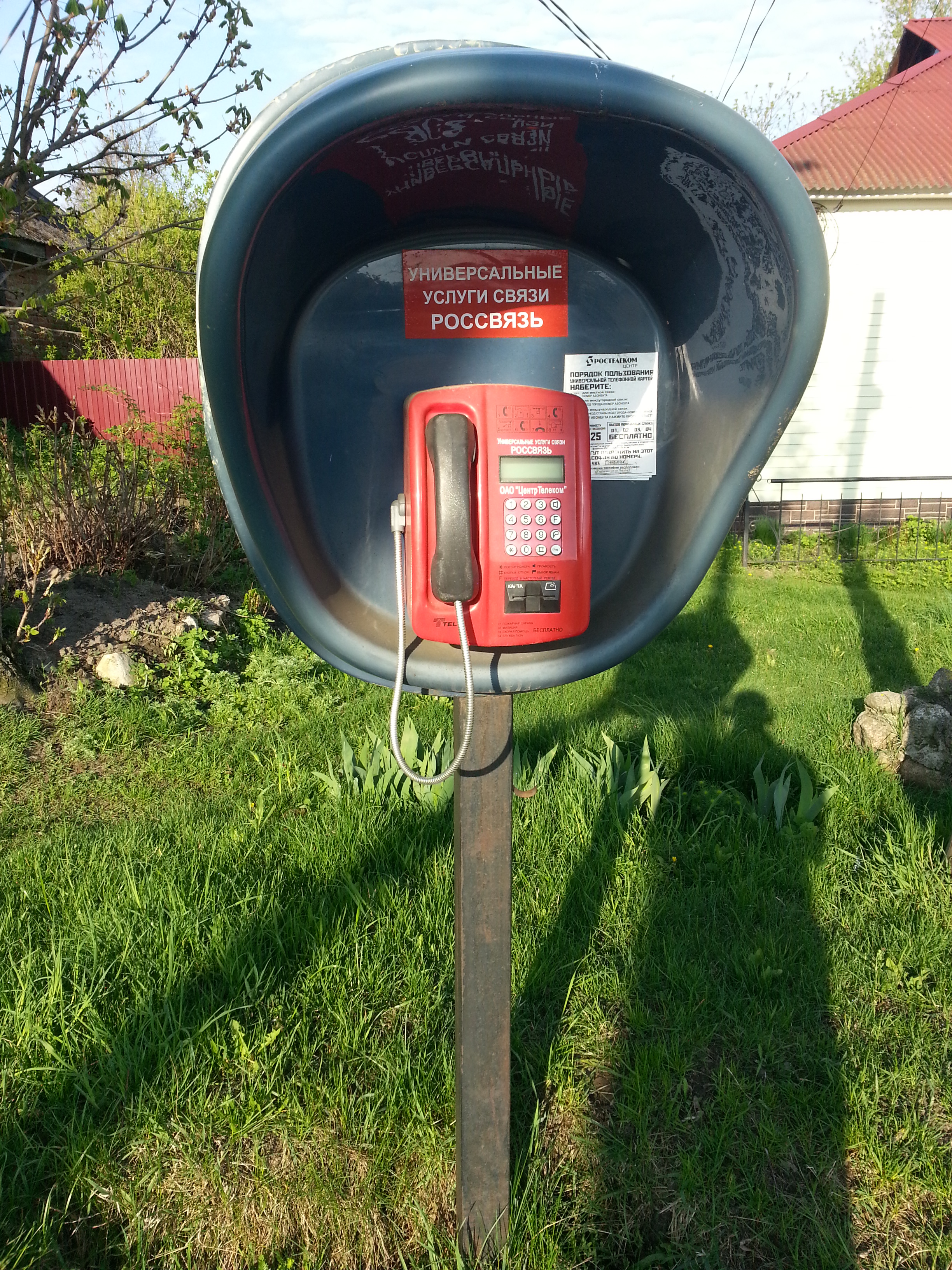 Таксофон в селе Гордеевка